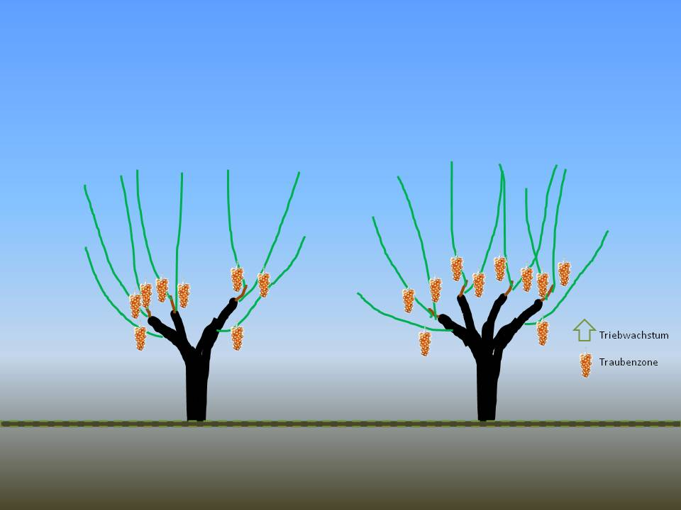 Schematischer Aufbau der Gobelet-Erziehung